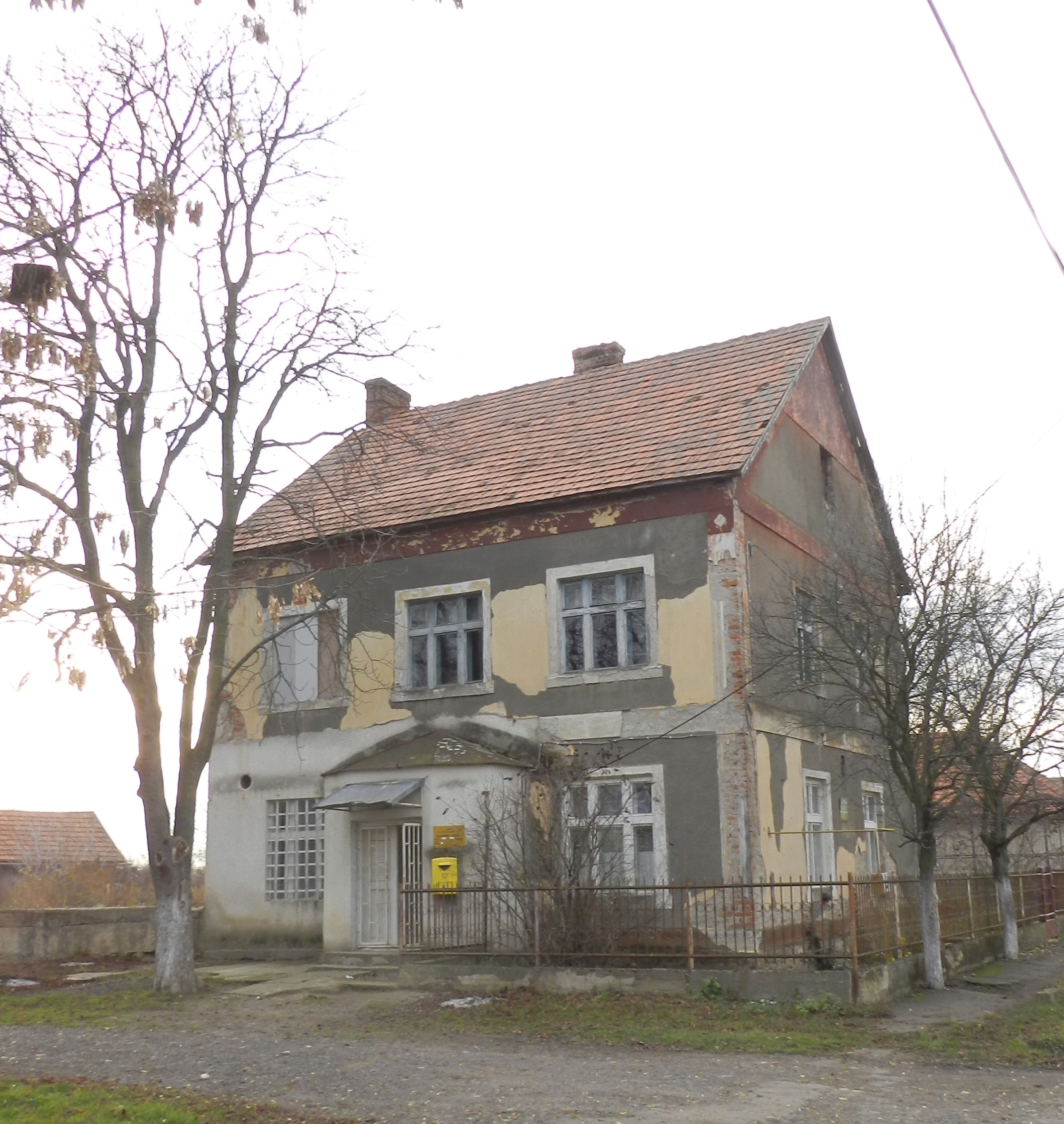 Будівля клубу, пошти та амбулаторії в с. Бакош